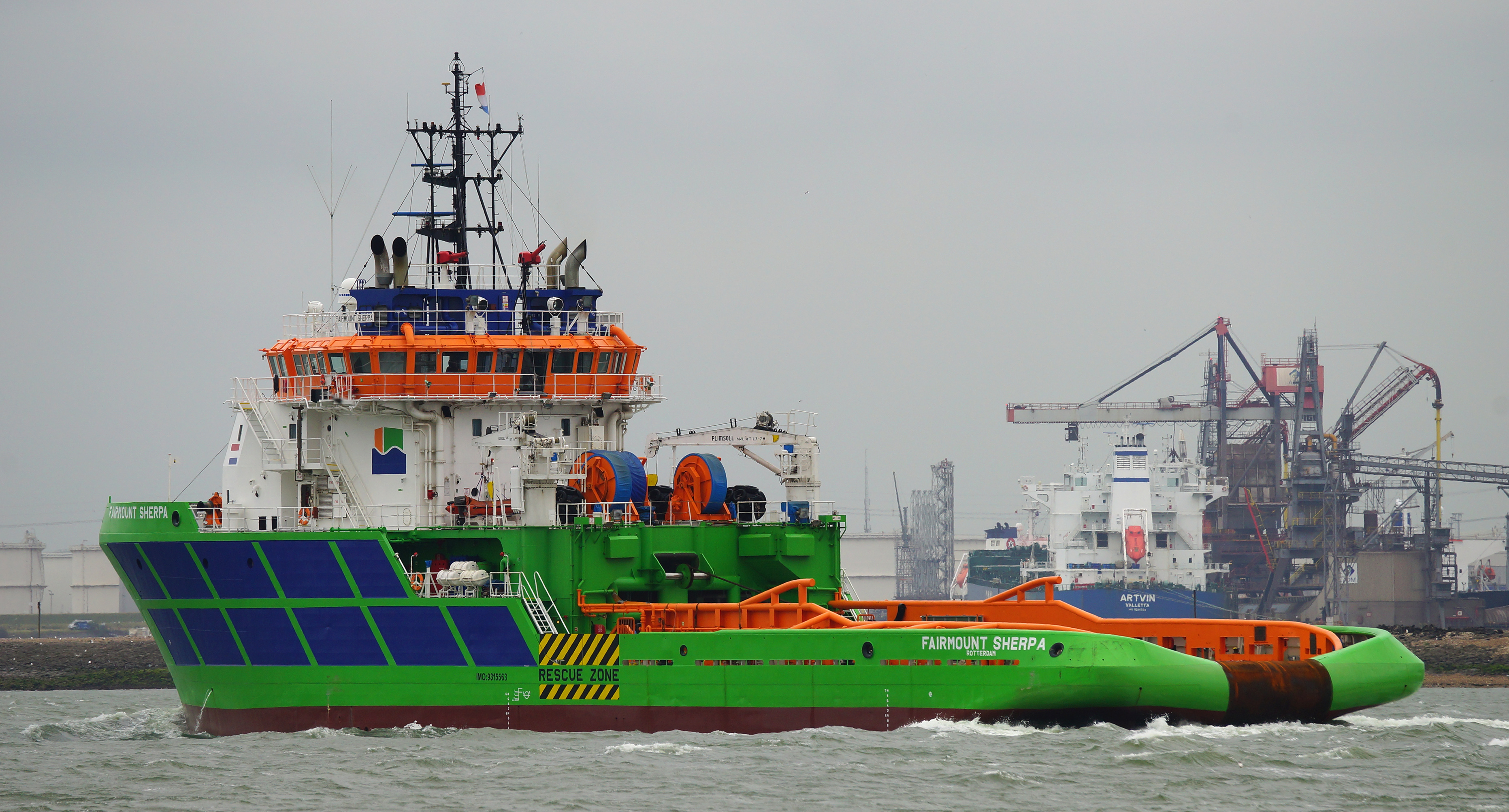 Nieuwe Waterweg 23-6-2015. Na dok beurt weer fris in de verf.